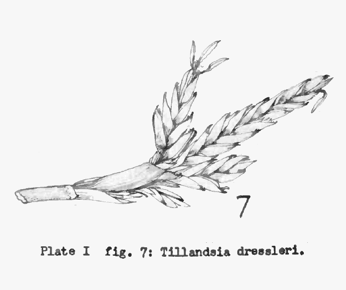 Tillandsia dresseleri, illustration du protologue réorganisée